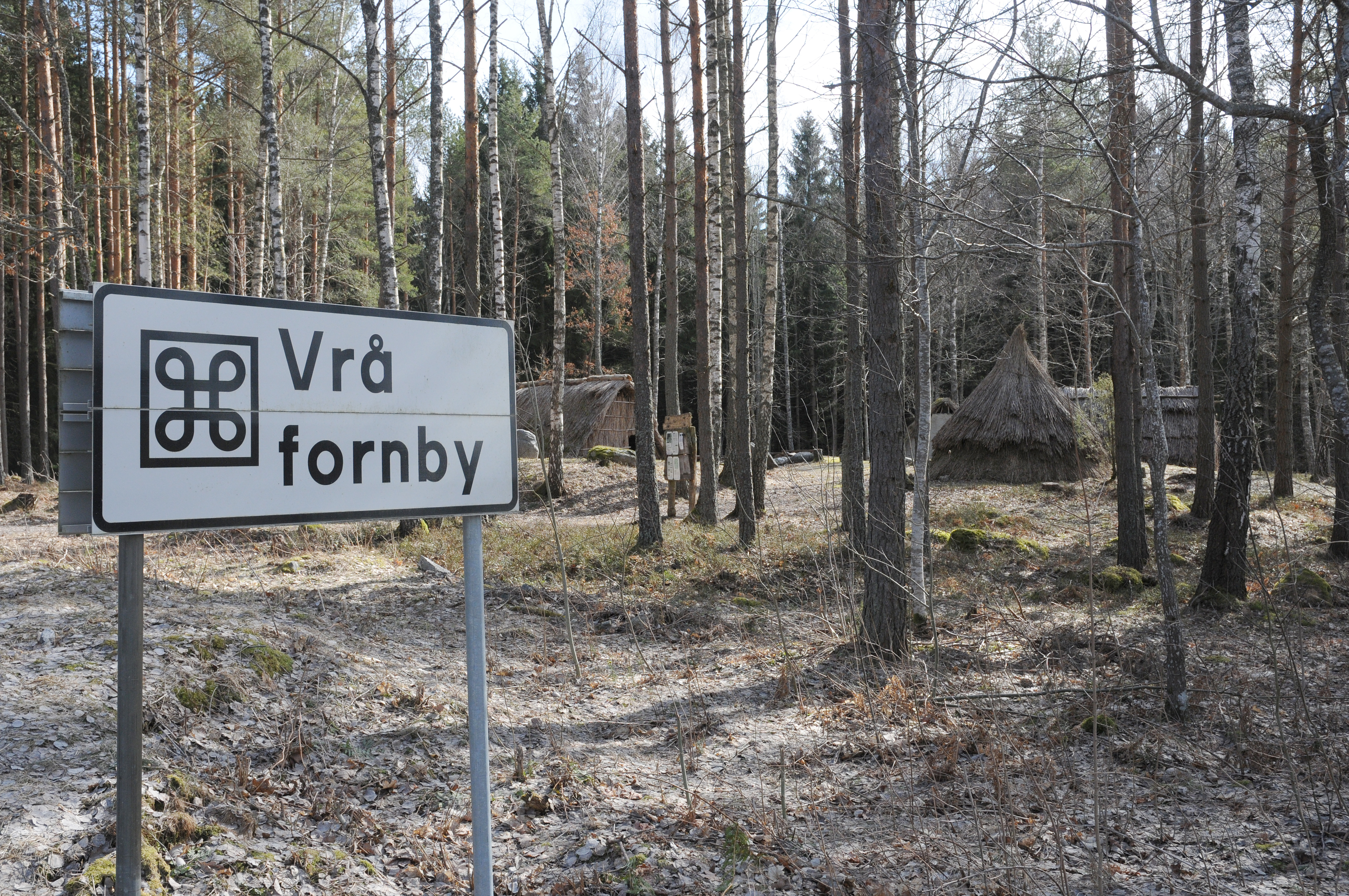 Vrå fornby i Katrineholms kommun